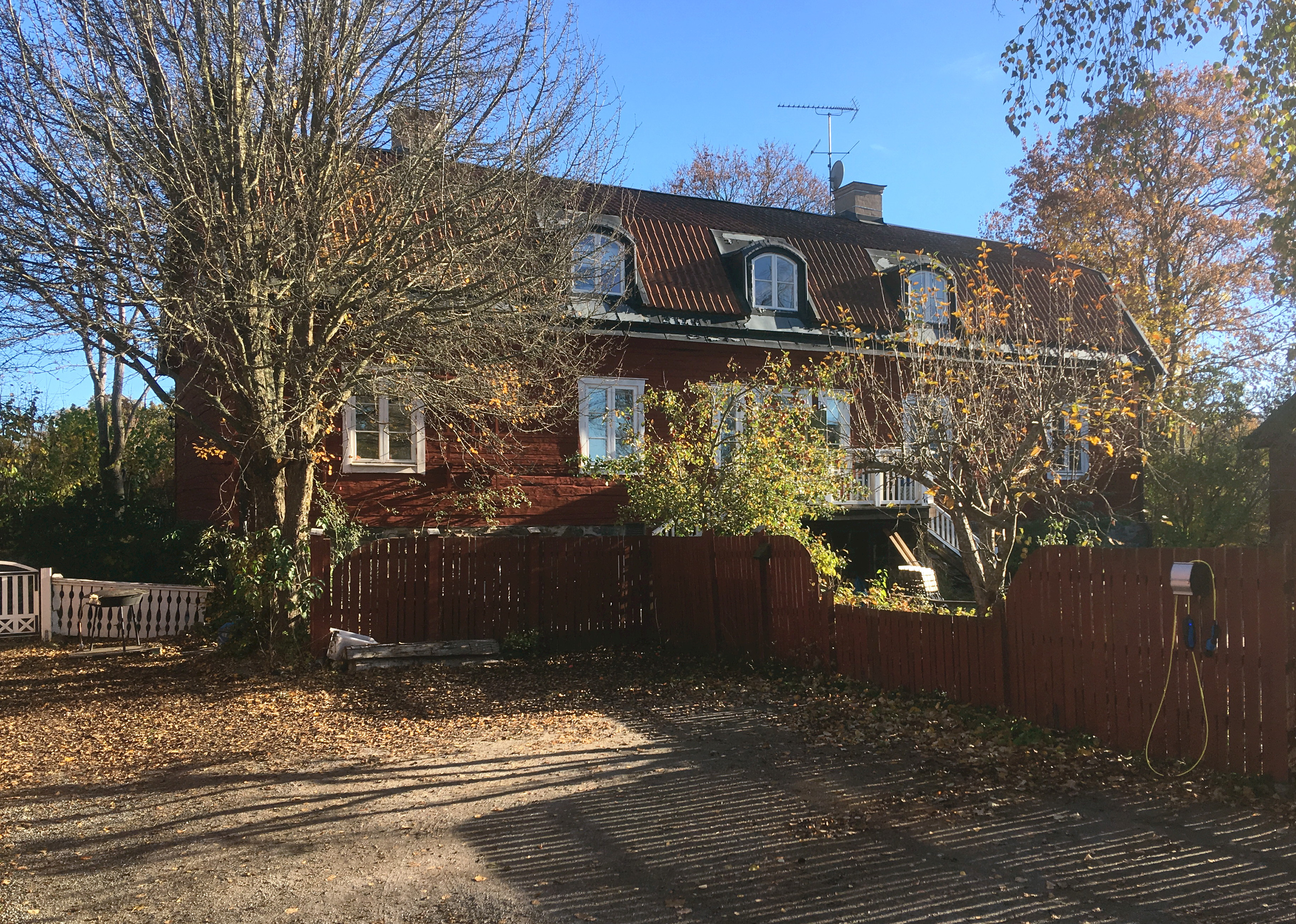 Ågesta gammelgården, huvudbyggnad